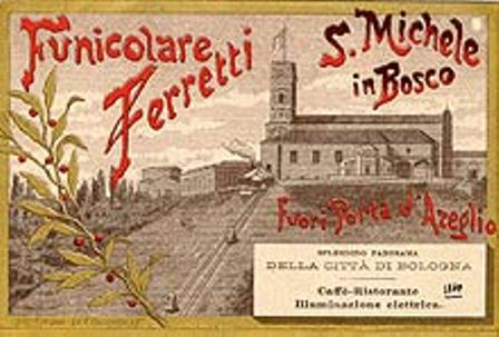 Funicolare Ferretti a Bologna